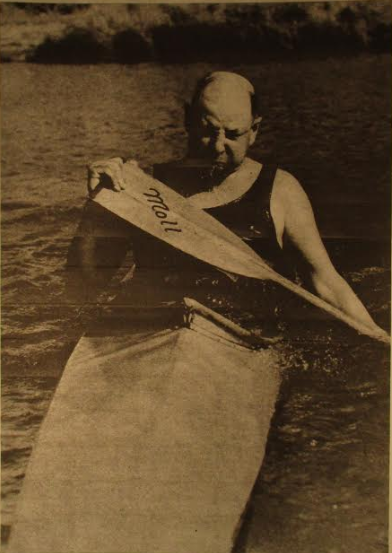 50 eskimokäännöstä, 50 vuotta elämää takana.